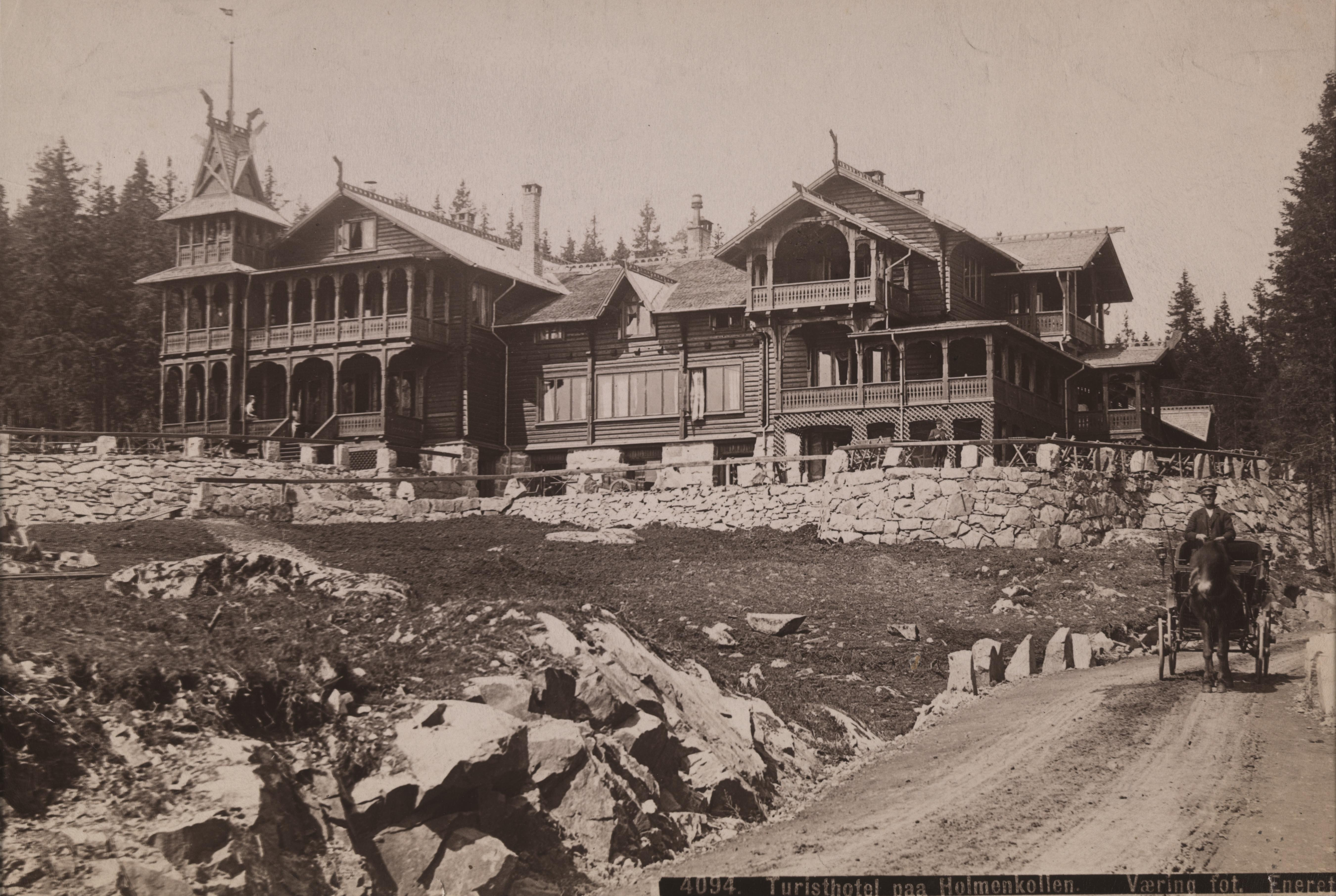 Bildet er hentet fra Nasjonalbibliotekets bildesamling Holmenkollen, Oslo, Oslo